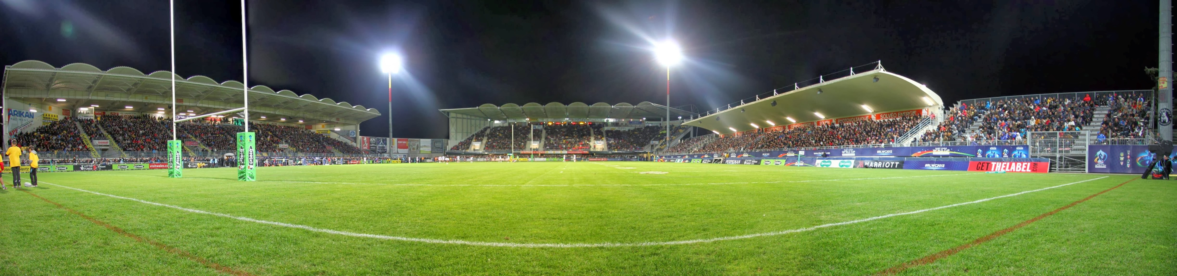 Le Stade Gilbert Brutus de Perpignan le 11 Novembre 2013 pour la coupe du monde de rugby à XIII.